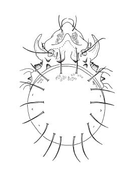 Tectodamaeus wulongensis